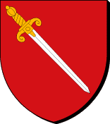 Blason de la famille de Villeneuve